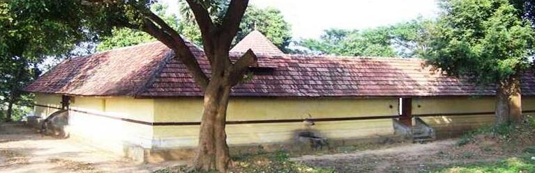 പാലൂർ പനയൂർ ശിവക്ഷേത്രം